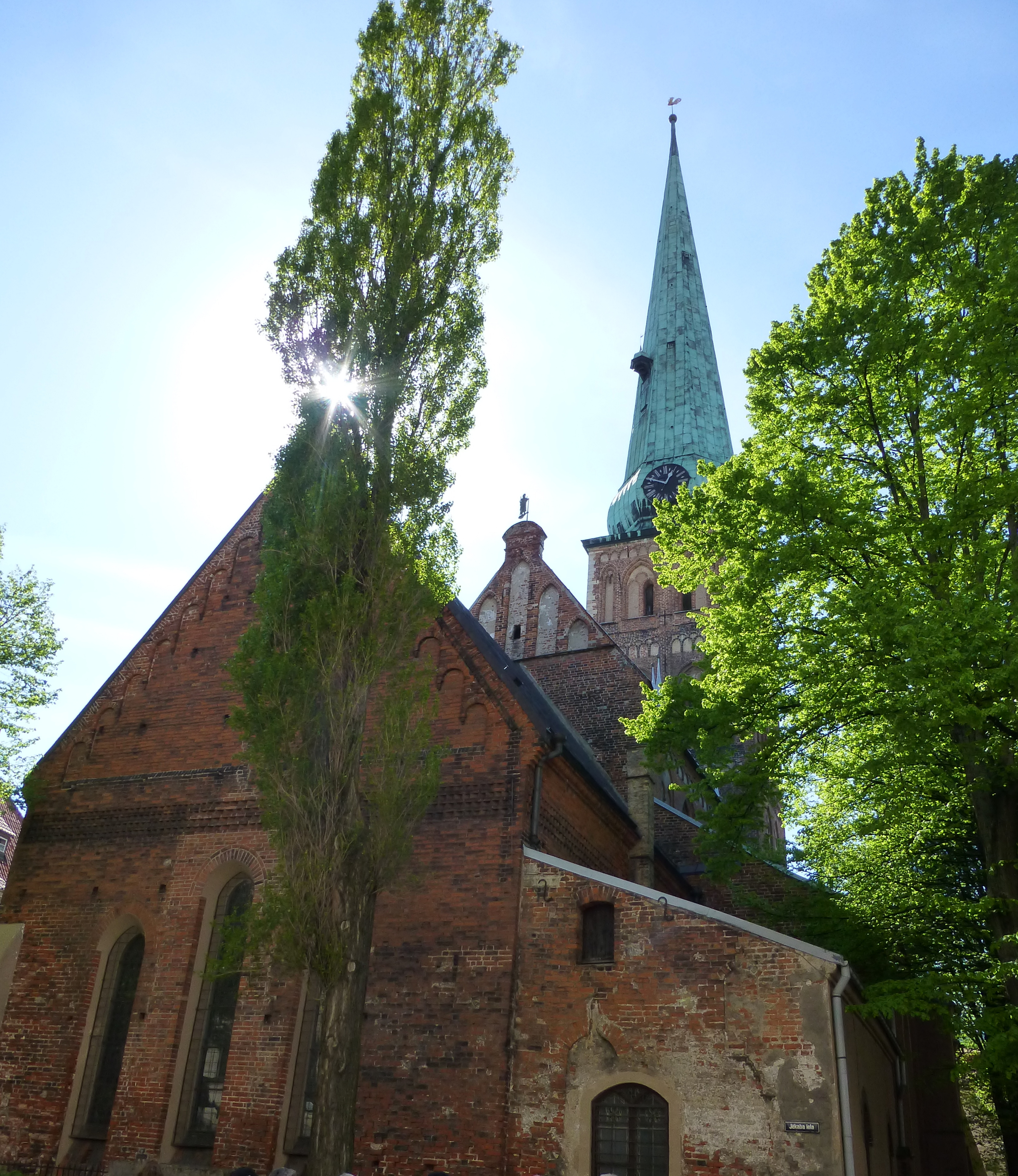 Riga - Sv. Jēkaba Katedrāles